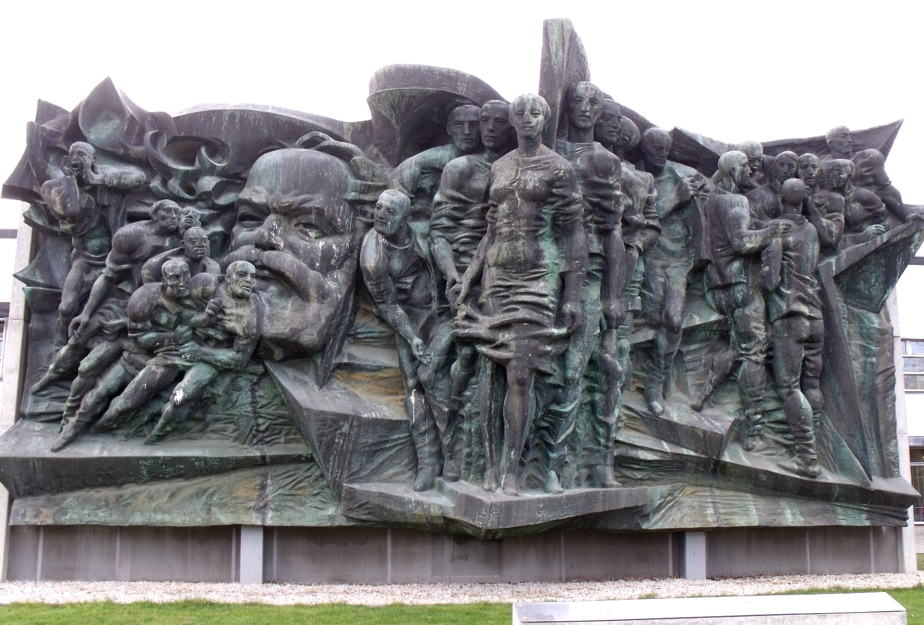 Das Bronzerelief "Aufbruch" in Leipzig, Gesamtansicht. Bildhauer: Frank Ruddigkeit, Klaus Schwabe und Rolf Kuhrt. Maße des gesamten Reliefs: Breite: 14 Meter, Höhe: 7 Meter, Gewicht: 33 Tonnen. Es befand sich von 1973 bis 2006 an einer Giebelwand der Universität Leipzig.